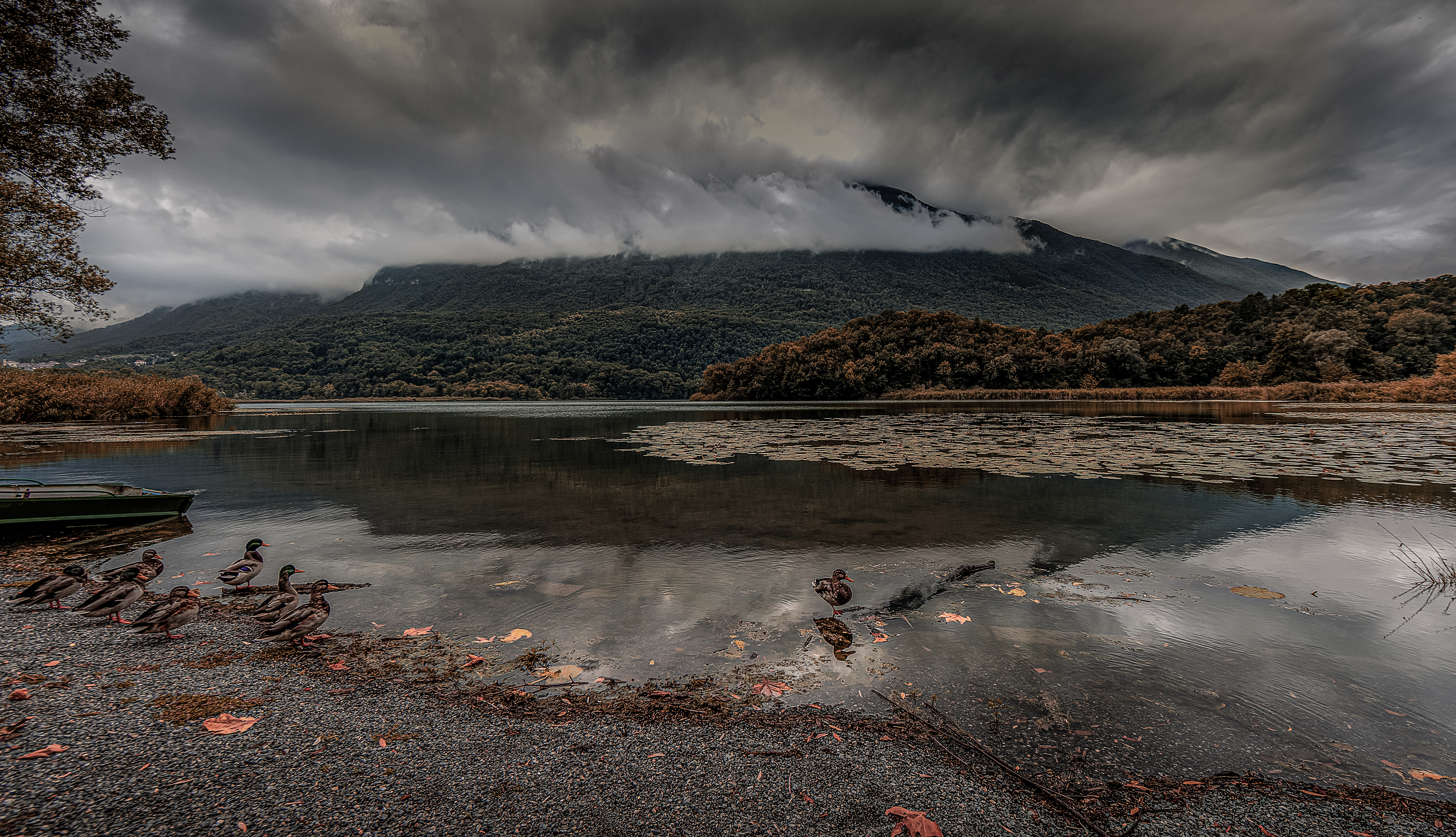 riserva naturale Lago di Piano This is a photo of a monument which is part of cultural heritage of Italy.